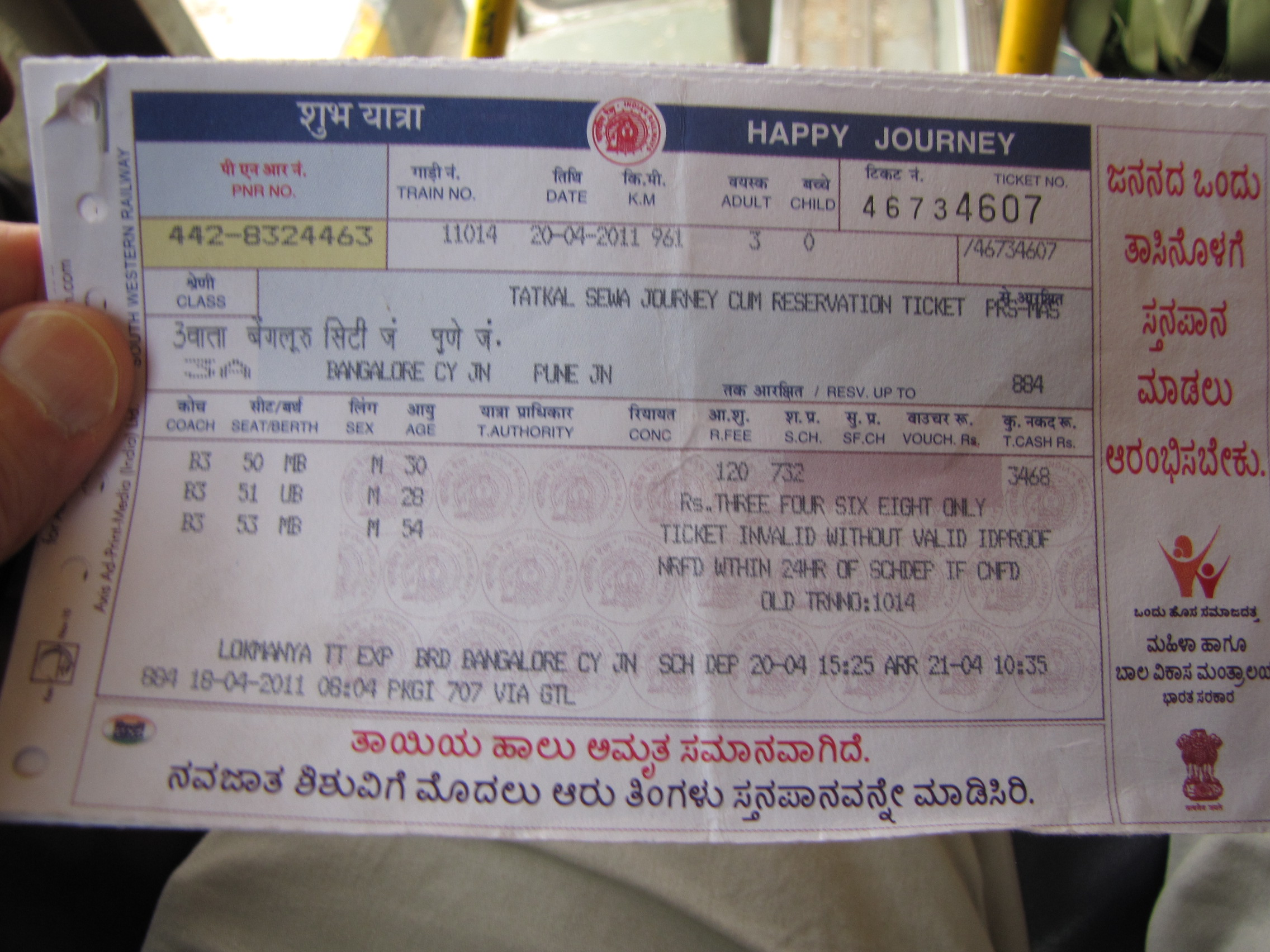 20110420_Hosur_to_Bengaluru_006